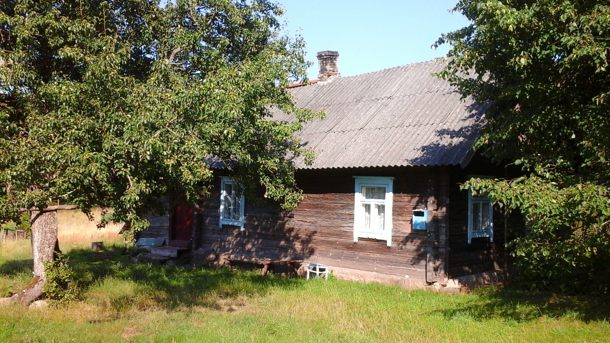 Деревенский дом в Кошкалах